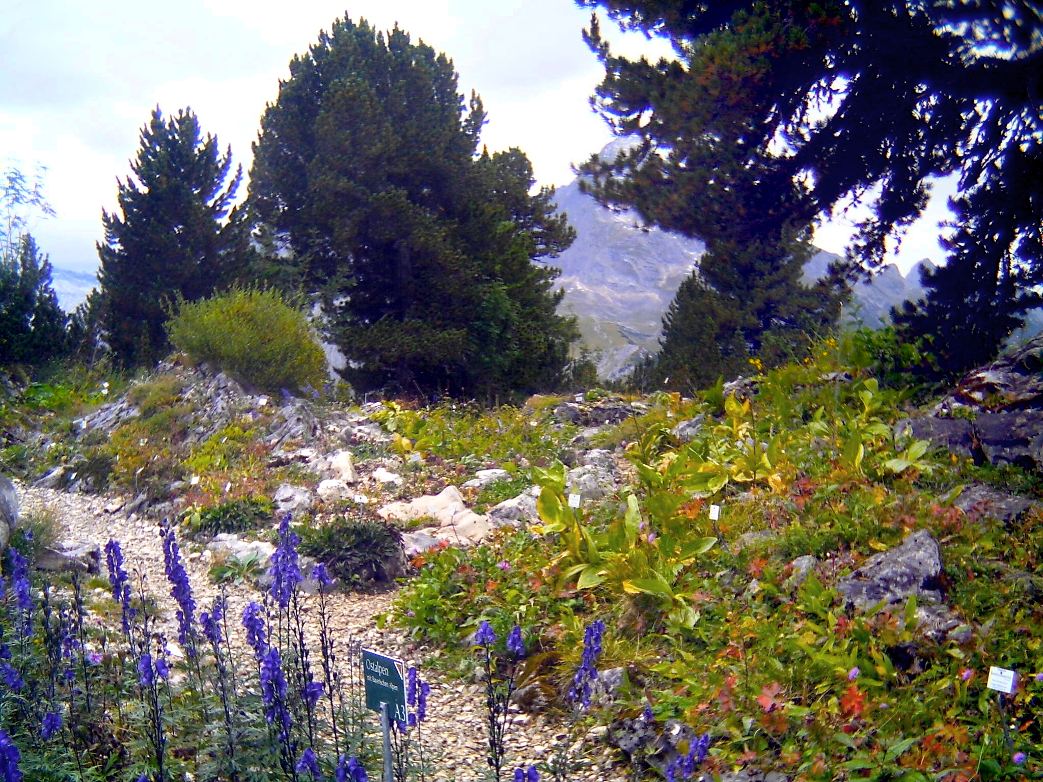 Alps-Garden Schachen, Bavaria